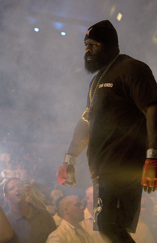 كيمبو سلايس.